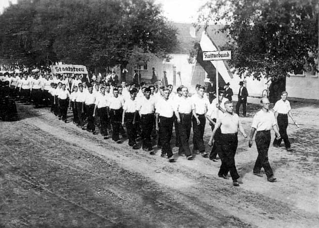 Parade des Schwäbisch-Deutschen Kulturbundes anlässlich der 175 Jahr-Feier in Filipowa, 1938